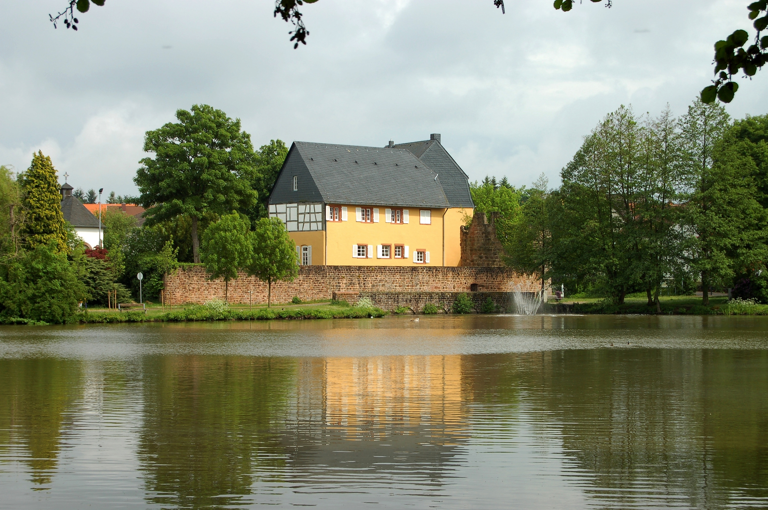 Die Gustavsburg in Jägersburg, Homburg. Sie beherbergt ein Schloss- und Burgmuseum.